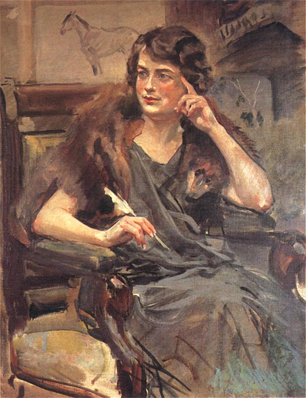 Portret córki Wojciecha Kossaka - Magdaleny Samozwaniec. Olej na płótnie. 98 x 78 cm.